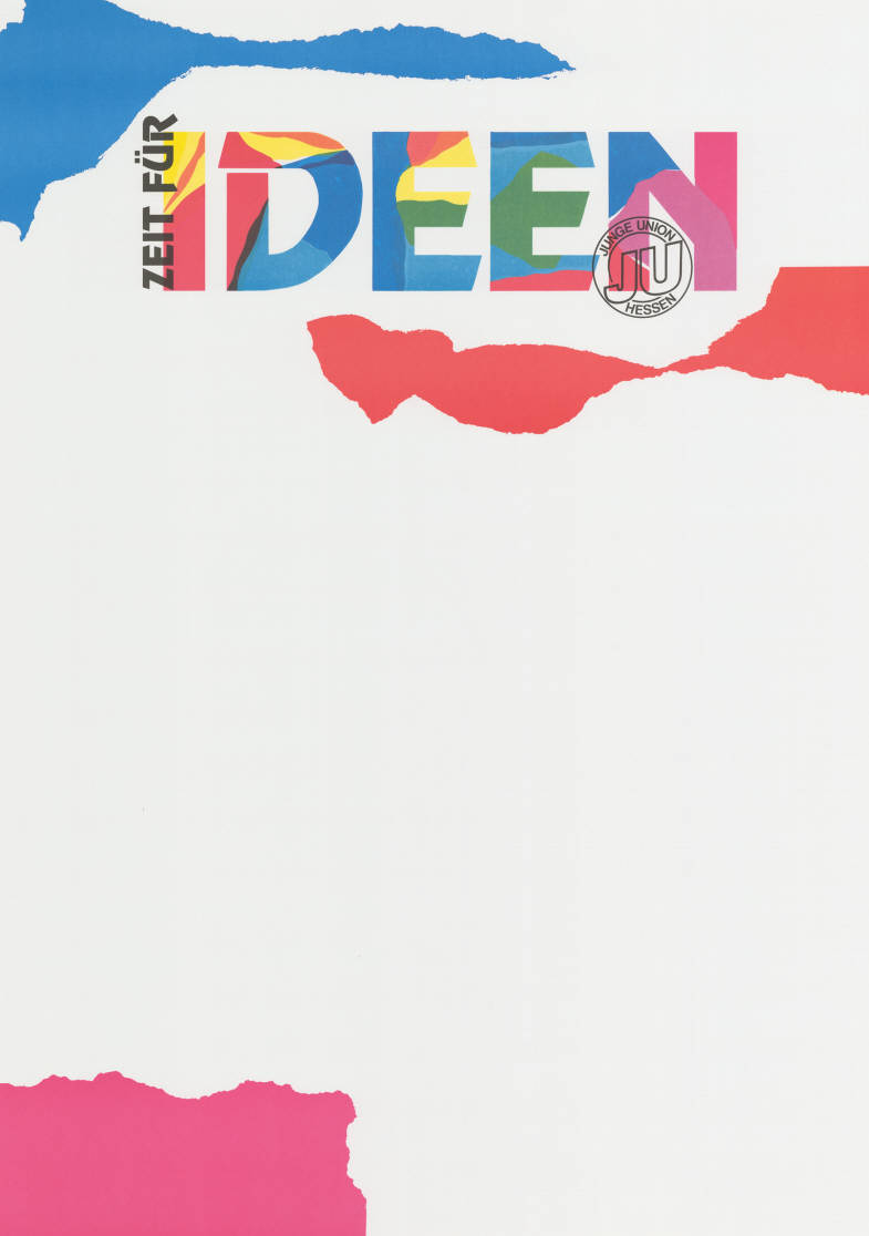 Zeit für Ideen Junge Union Hessen Plakatart: Blanko-/Ankündigungsplakat Objekt-Signatur: 10-028 : 226 Bestand: Plakate von Jugendorganisationen der Parteien ( 10-028) GliederungBestand10-18: Plakate von Jugendorganisationen der Parteien (10-028) » CDU » Veranstaltungsplakate A - Z Lizenz: KAS/ACDP 10-028 : 226 CC-BY-SA 3.0 DE